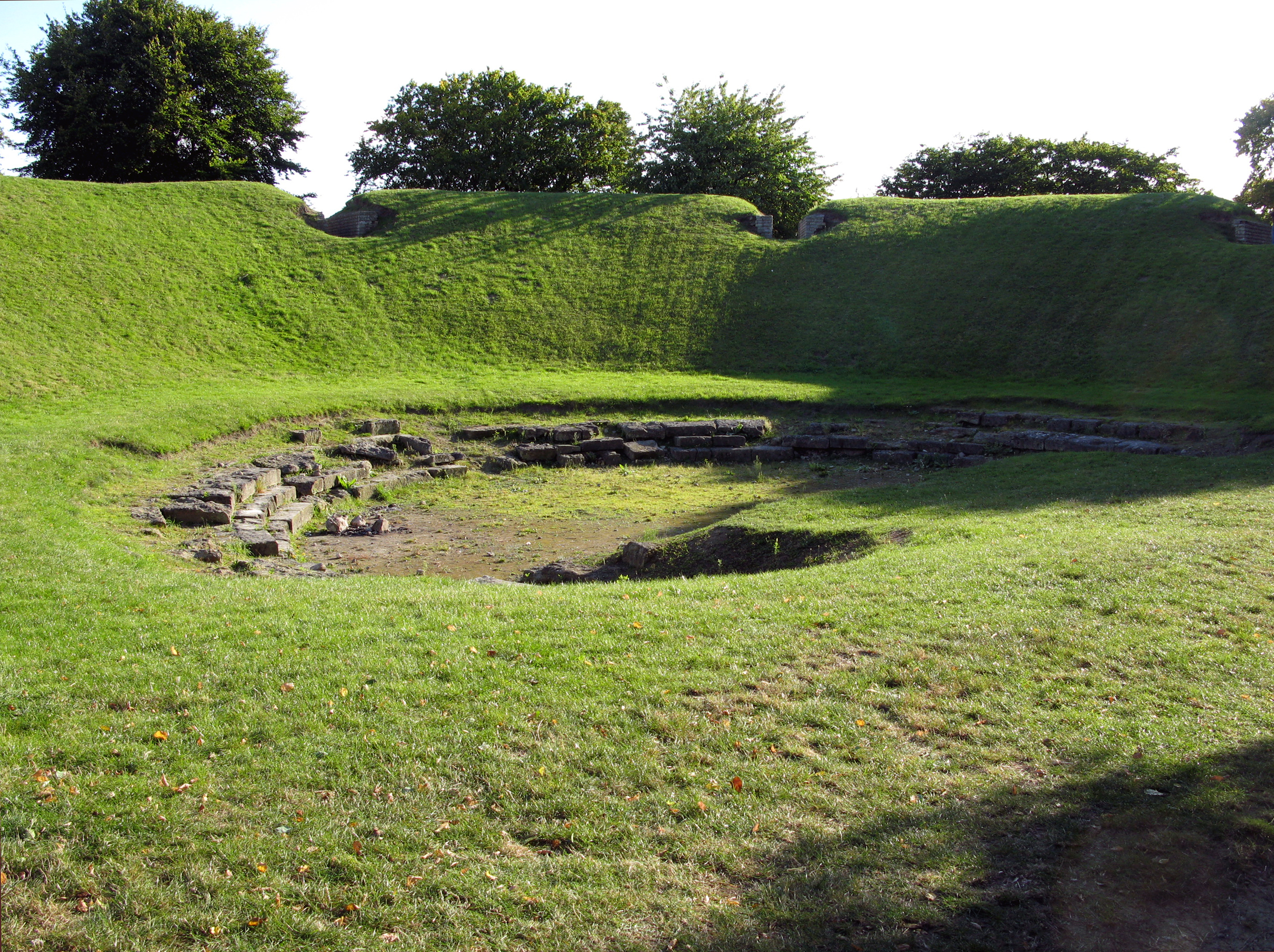 Champlieu (Oise, France) - Théâtre antique. . . .